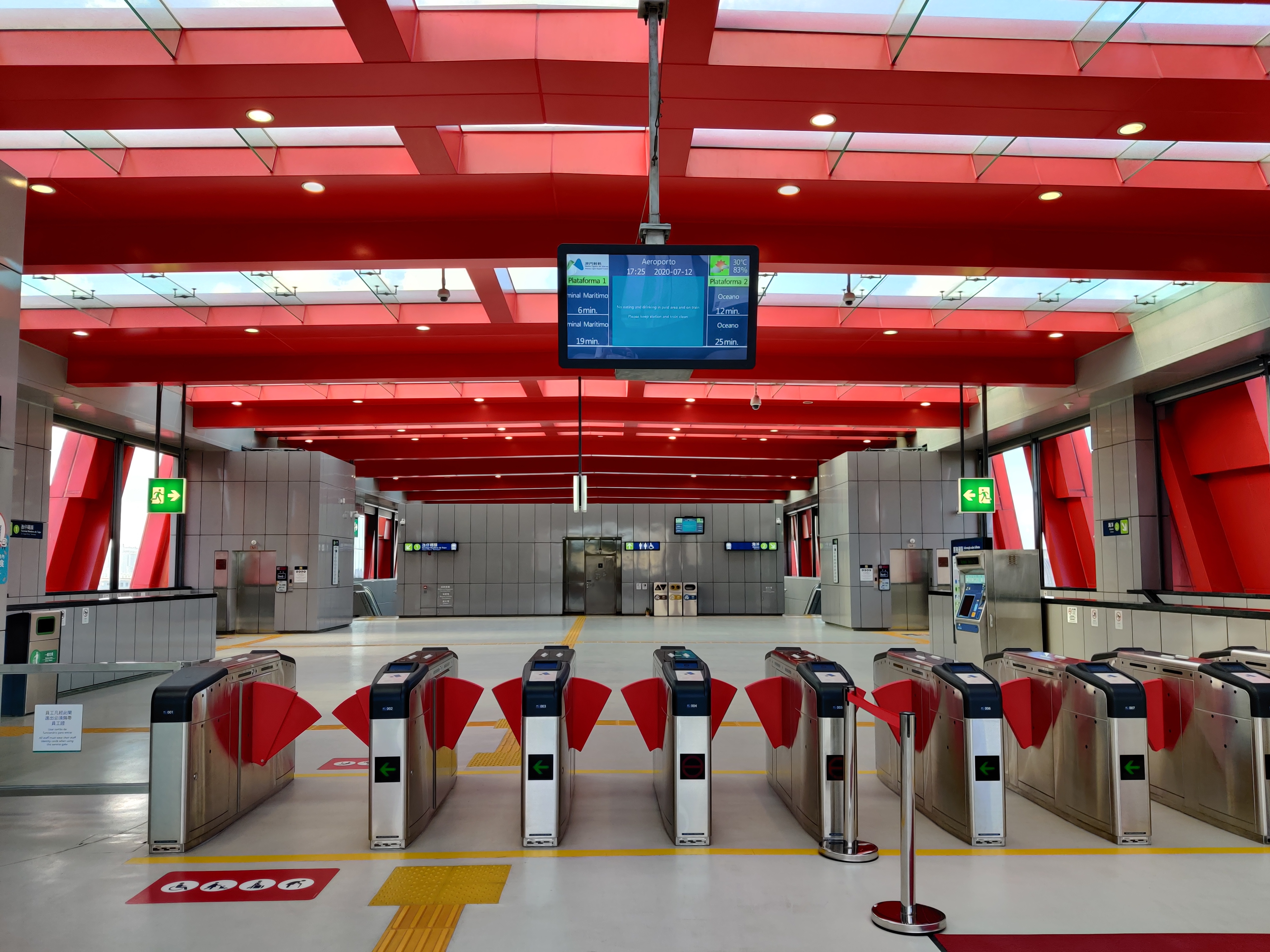 中文（香港）: 澳門輕軌機場站大堂